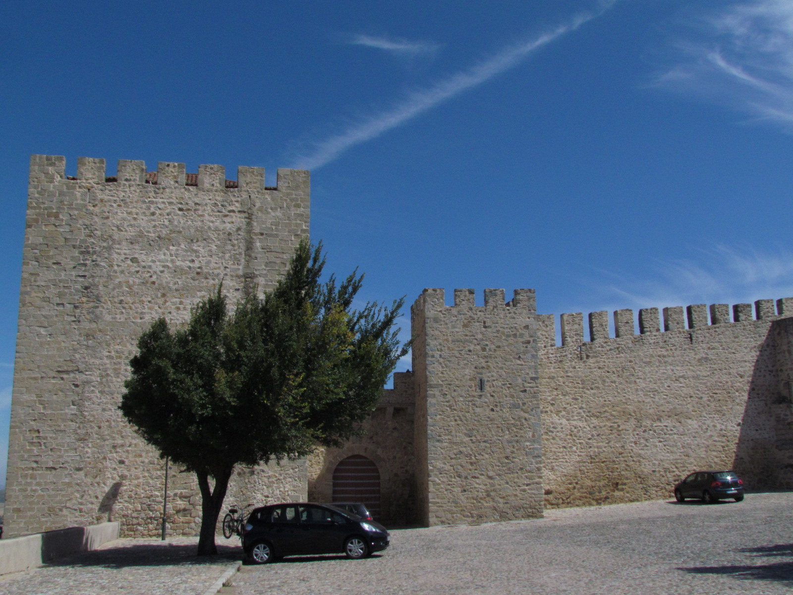 Castillo de Elvas (Portalegre, Portugal)